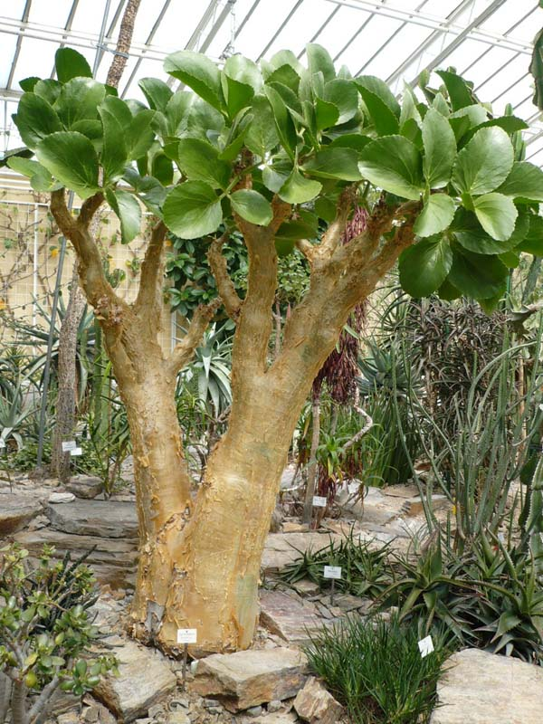 Cyphostemma_corrorii ca. 2,4 m hoch